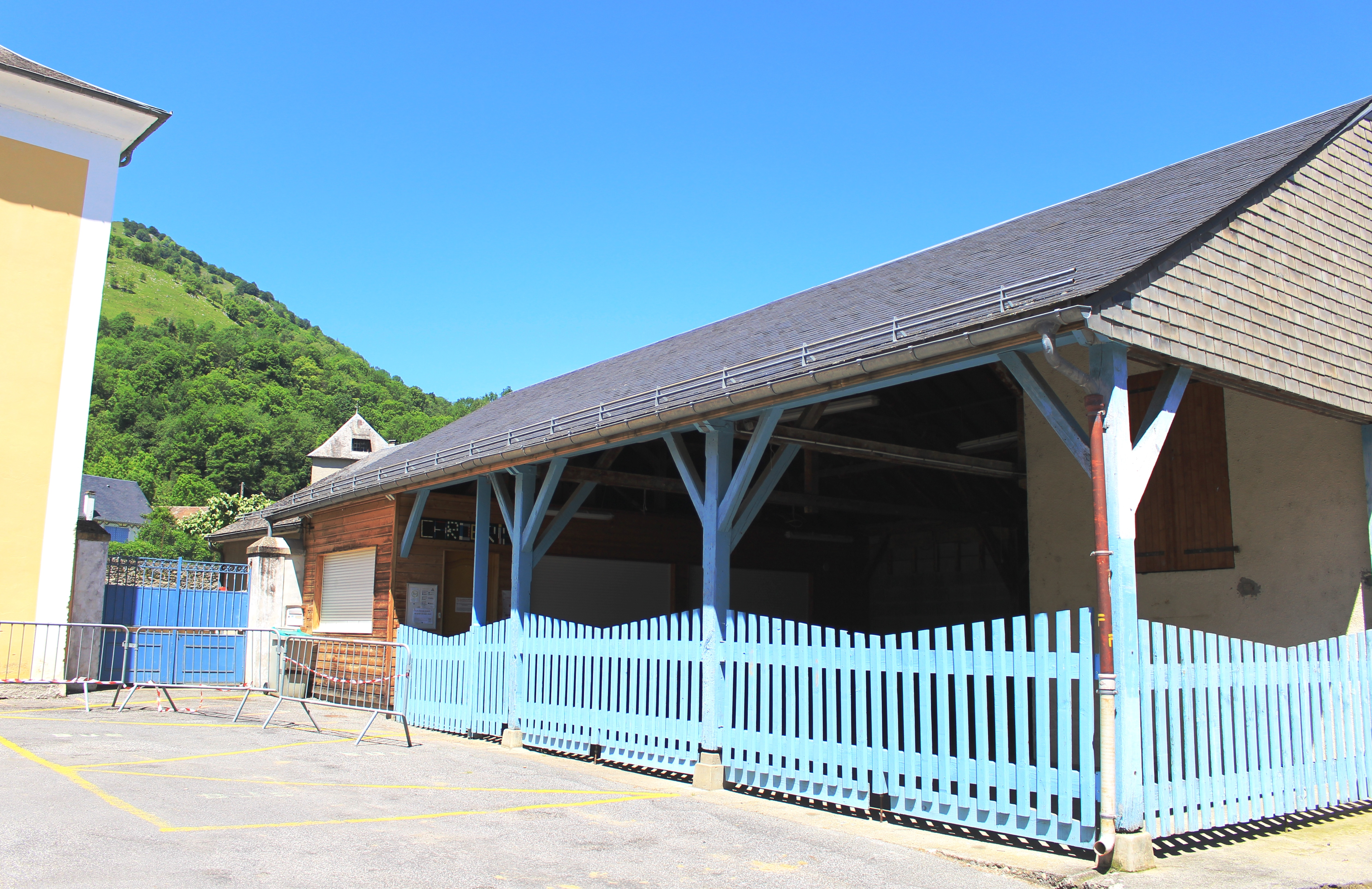 École de Beaudéan (Hautes-Pyrénées)